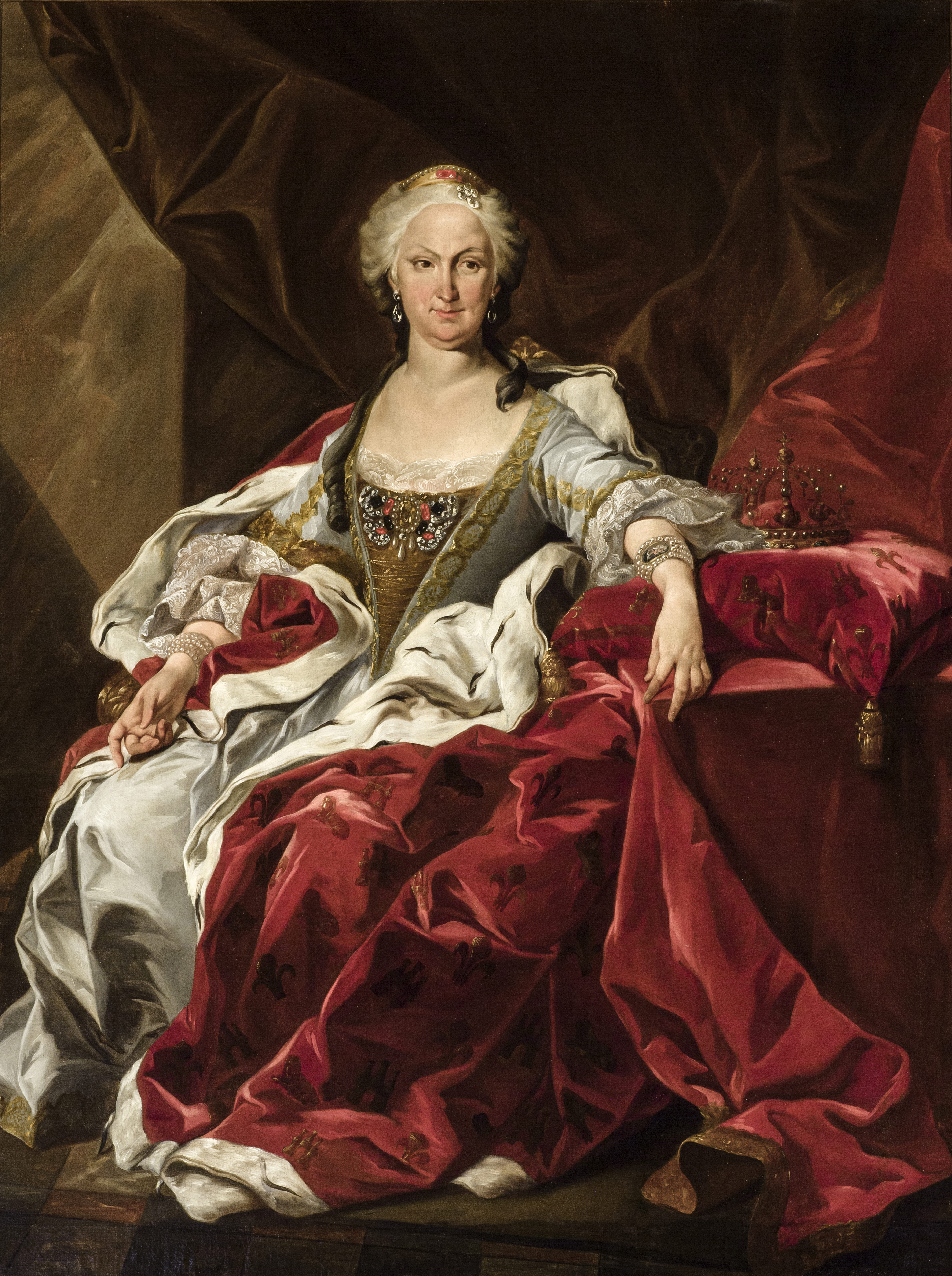 Retrato de la reina Isabel de Farnesio (1692-1766), que fue la segunda esposa del rey Felipe V de España. Esta obra es una copia anónima de finales del siglo XVIII del retrato de la misma soberana que fue pintado en 1739 por Louis-Michel van Loo y que se conserva en el madrileño Museo del Prado.